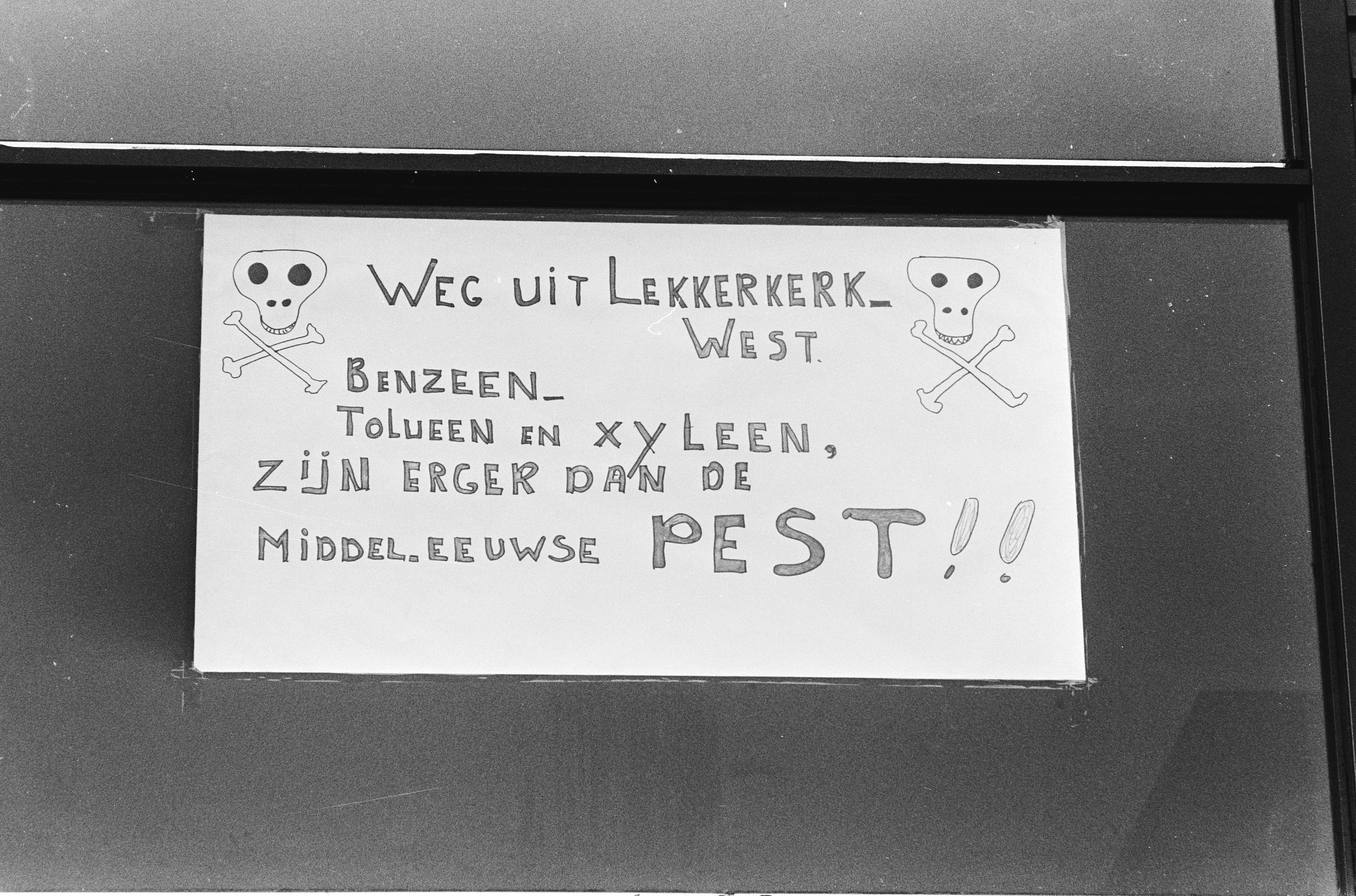 Collectie / Archief : Fotocollectie Anefo Reportage / Serie : [ onbekend ] Beschrijving : Werkzaamheden in "gifwijk" in Lekkerkerk; bord met tekst: "Weg uit Lekkerkerk West , benzeen, toleen en xyleen zijn erger dan de pest" Datum : 2 juni 1980 Locatie : Lekkerkerk Trefwoorden : BENZEEN Fotograaf : Antonisse, Marcel / Anefo Auteursrechthebbende : Nationaal Archief Materiaalsoort : Negatief (zwart/wit) Nummer archiefinventaris : bekijk toegang 2.24.01.05 Bestanddeelnummer : 930-8577